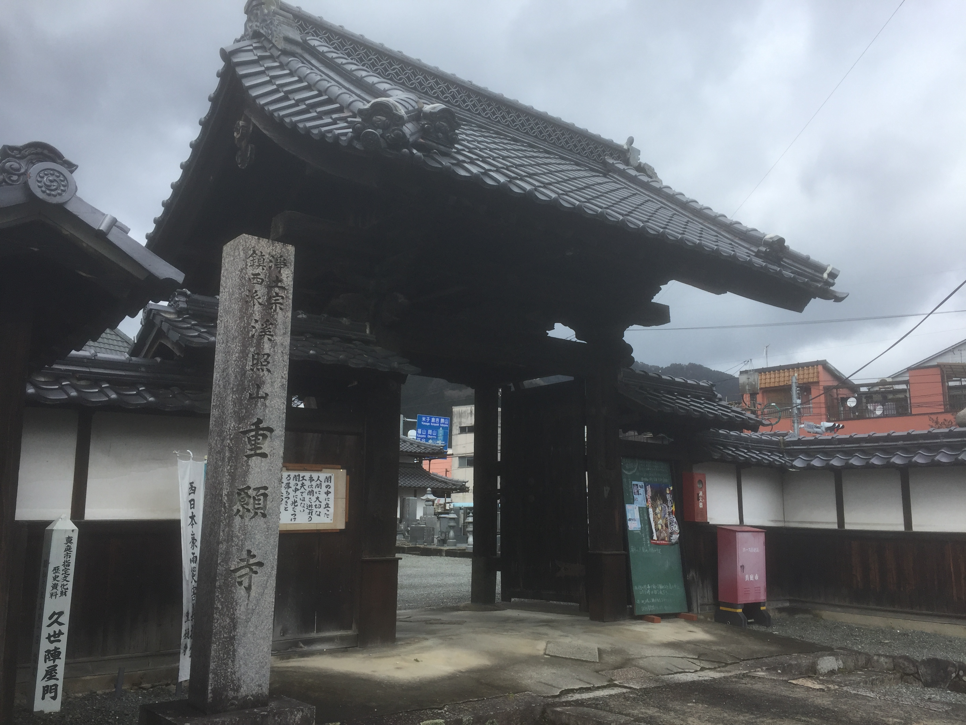 真庭市久世の重願寺の山門。平成31年3月撮影。